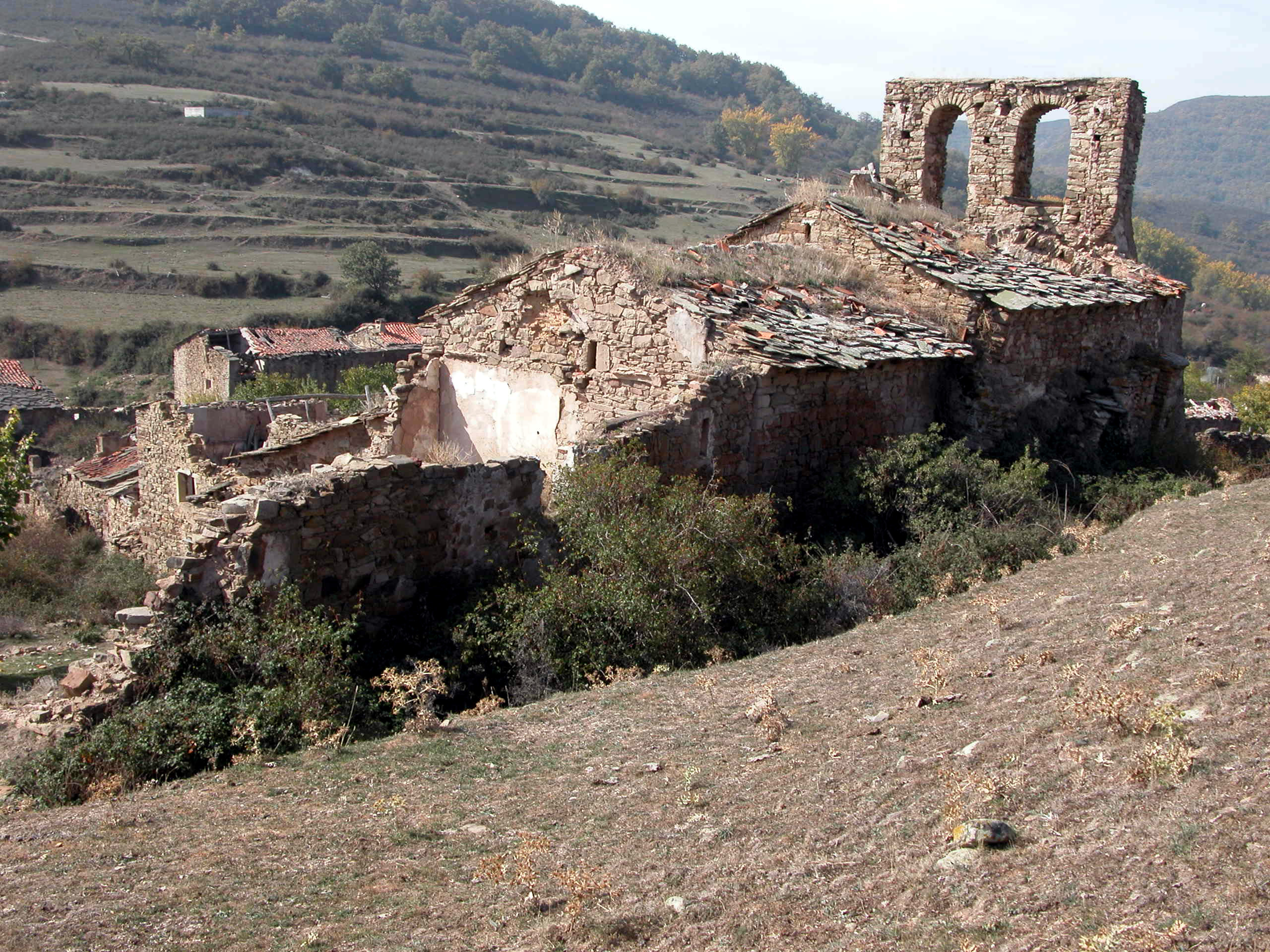 Ruinas de la iglesia de San Juan Bautista en El Collado (Santa Engracia del Jubera, La Rioja, España).